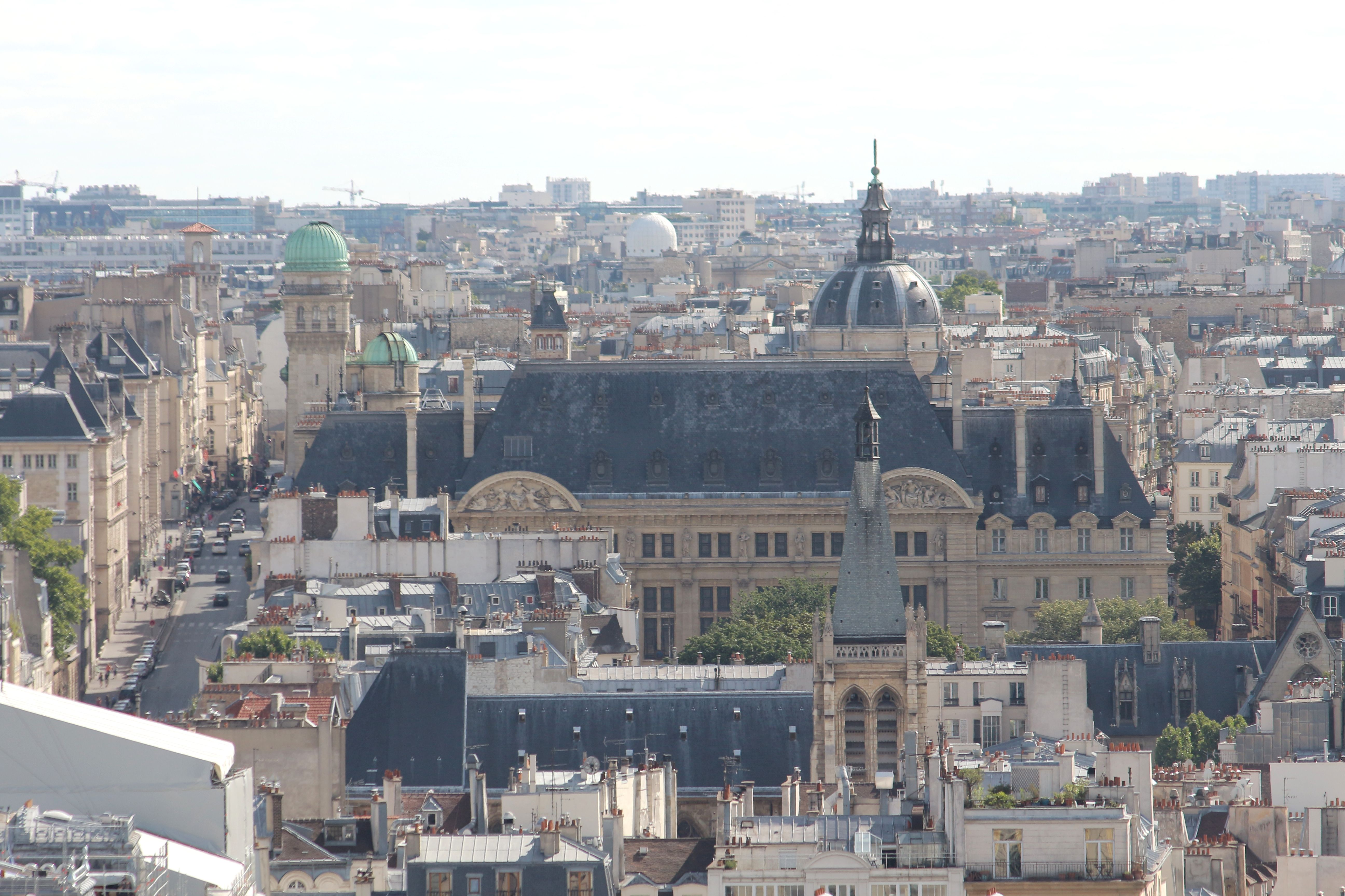 La Sorbonne vue depuis le sommet de la Tour Saint-Jacques, avec le clocher de l'église Saint-Séverin